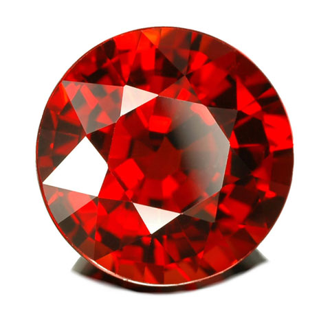 白い背景のガーネットの写真です。